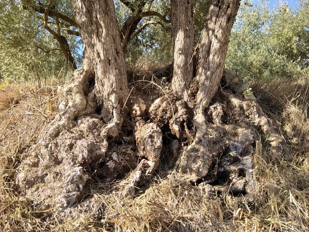 Racines d'olivier